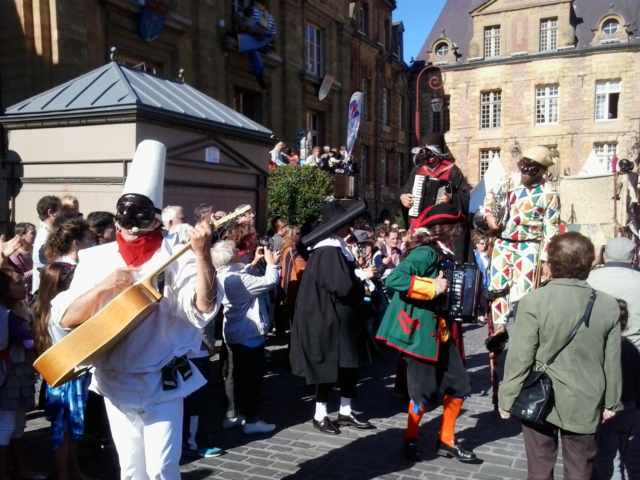 Parade Zan Ganassa, commedia dell'arte, téâtre del Drago Ravenna Italy Festival Marionettes à Charleville Mézières